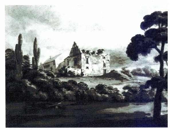 Ruiny zamku Strzyżewickiego (stan z 1852 roku, według akwareli K. Stronczyńskiego) 03.1967.